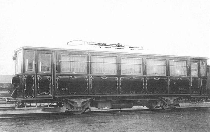 A BHÉV egyik első motorkocsija (psz. M4) egy 1906-os felvételen